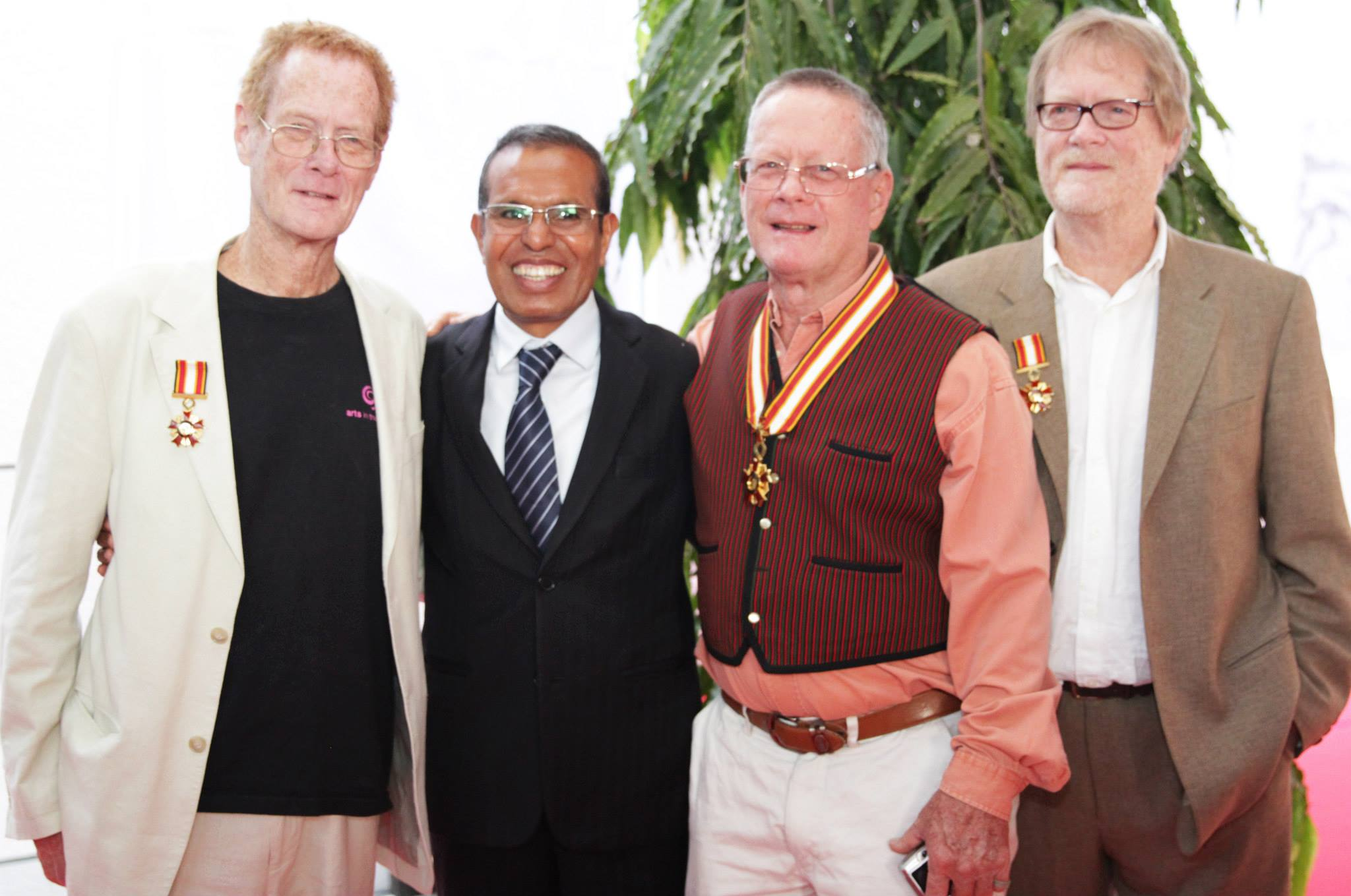 Verleihung des Ordem de Timor-Leste, 30. August 2014. Von links: Martin Wesley-Smith, Taur Matan Ruak, Robert Wesley-Smith und Peter Wesley-Smith